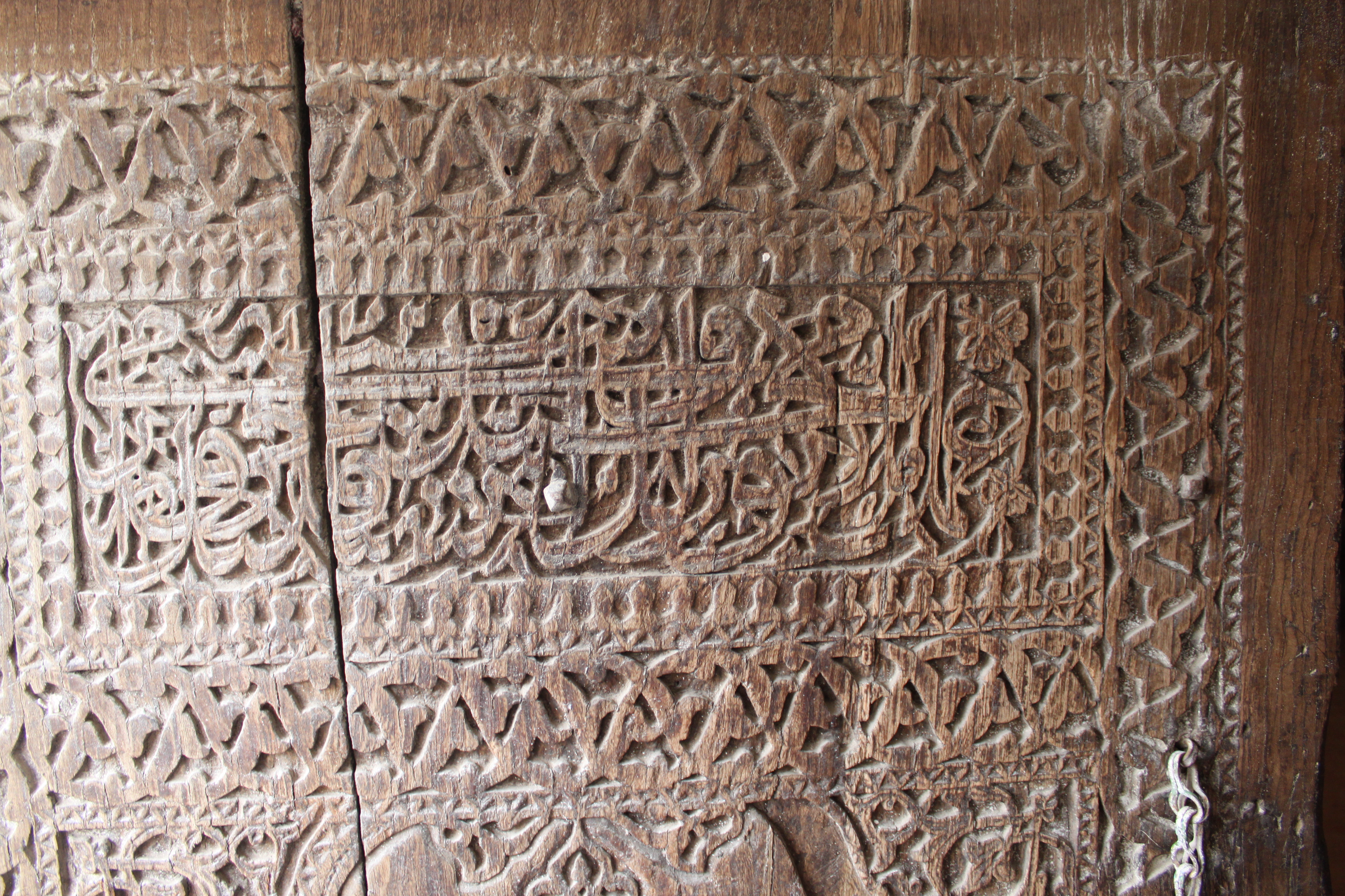 mosquée blanche (ou mosquée AK) : detail porte sculptéé